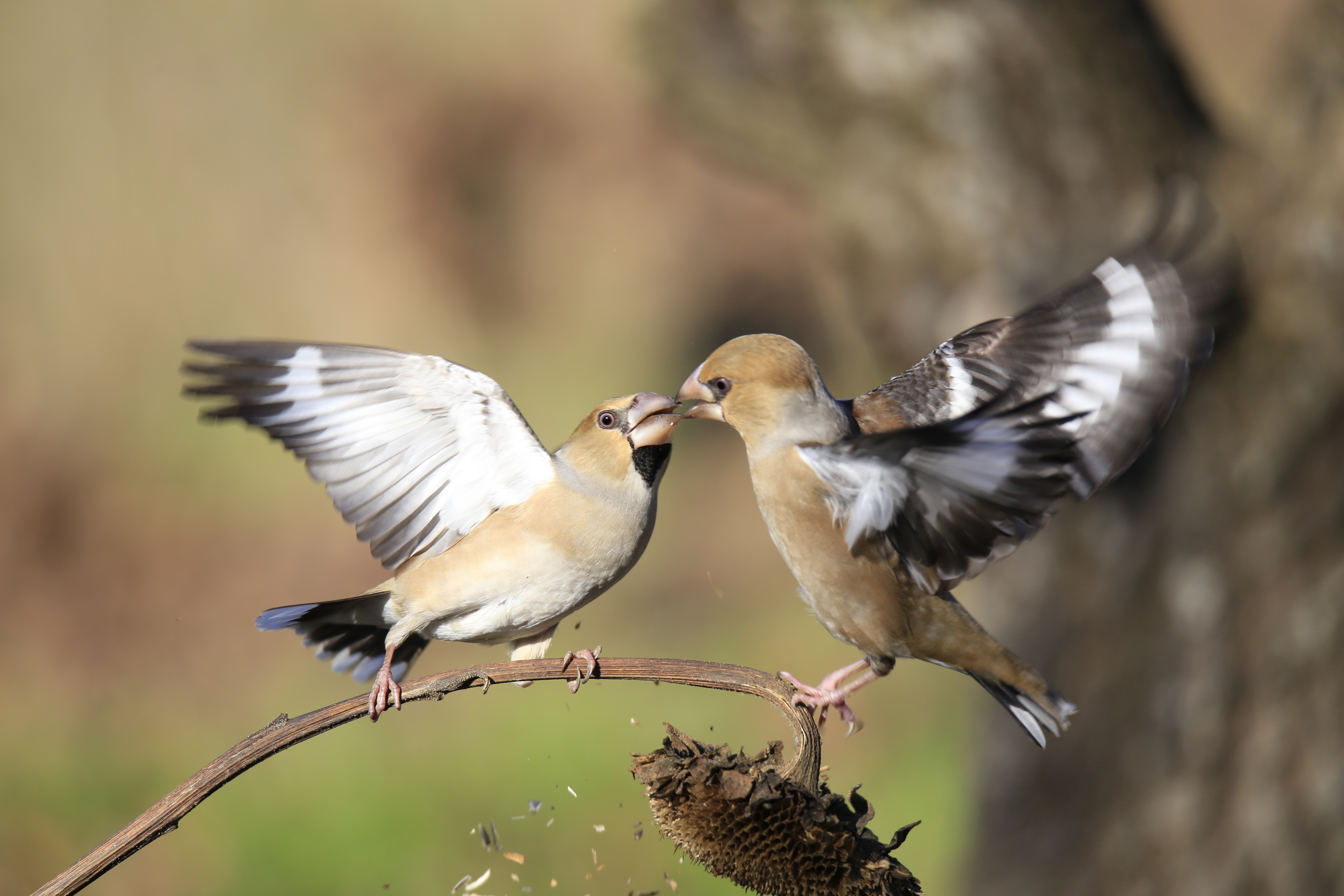 Frosone comune (Coccothraustes coccothraustes)